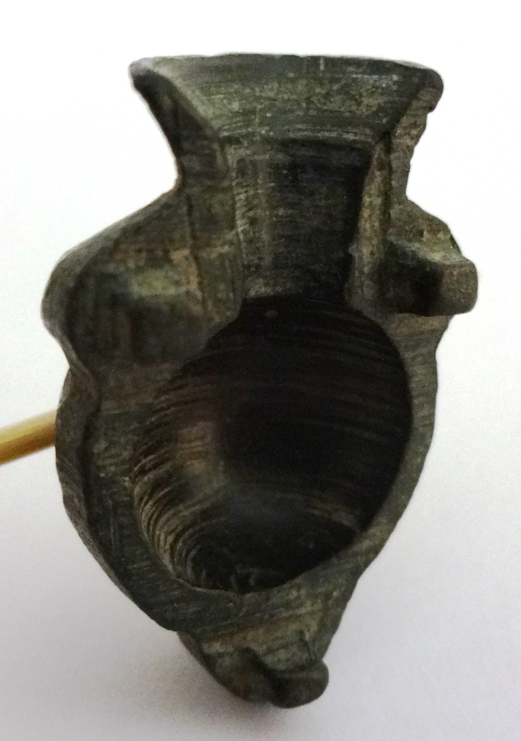 Hälfte einer Bronzehohlform zum Gießen von Projektilen mit 13mm Durchmesser für Vorderlader, 28mm hoch